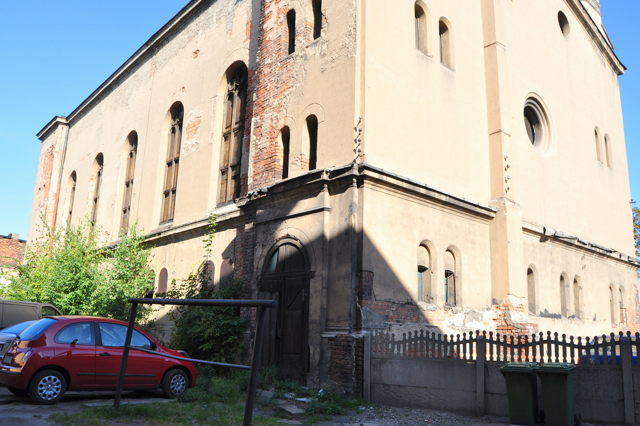 Ostrów Wlkp. ul. Raszkowska. Bóżnica przed renowacją. Widok elewacji południowej i wschodniej